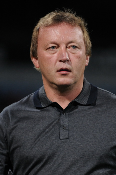 Владимир Богданович Шаран — советский и украинский футболист, тренер.